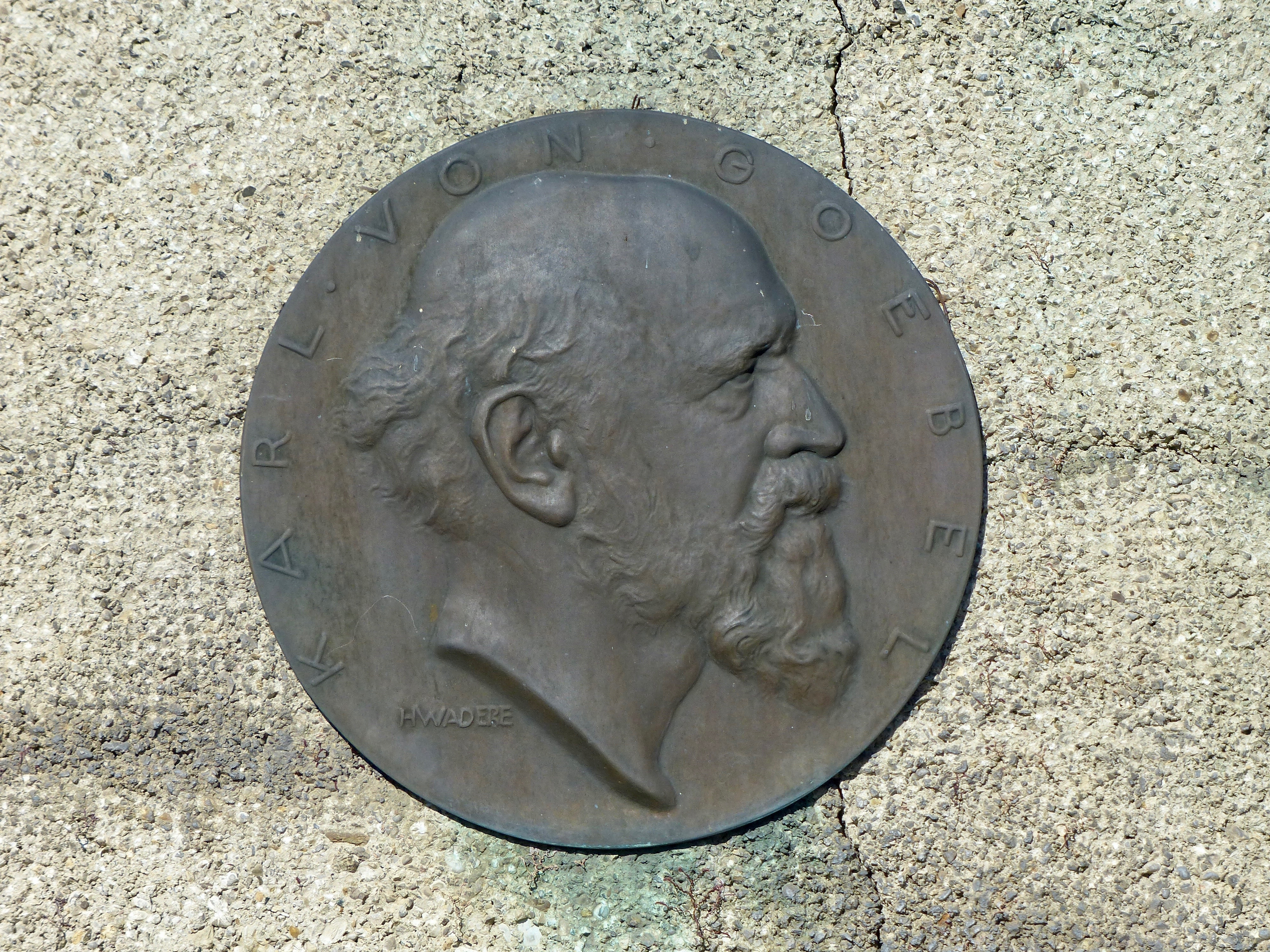 Führung und Fotoexkursion in den Botanischen Garten München-Nymphenburg im Rahmen des WikiAlpenforums: Plakette für Karl von Goebel am Hauptgebäude (Heinrich Waderé)